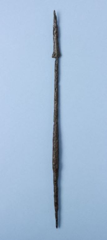 Merovingiajalle 550–800-luvuille ajoitettu suomalainen ango